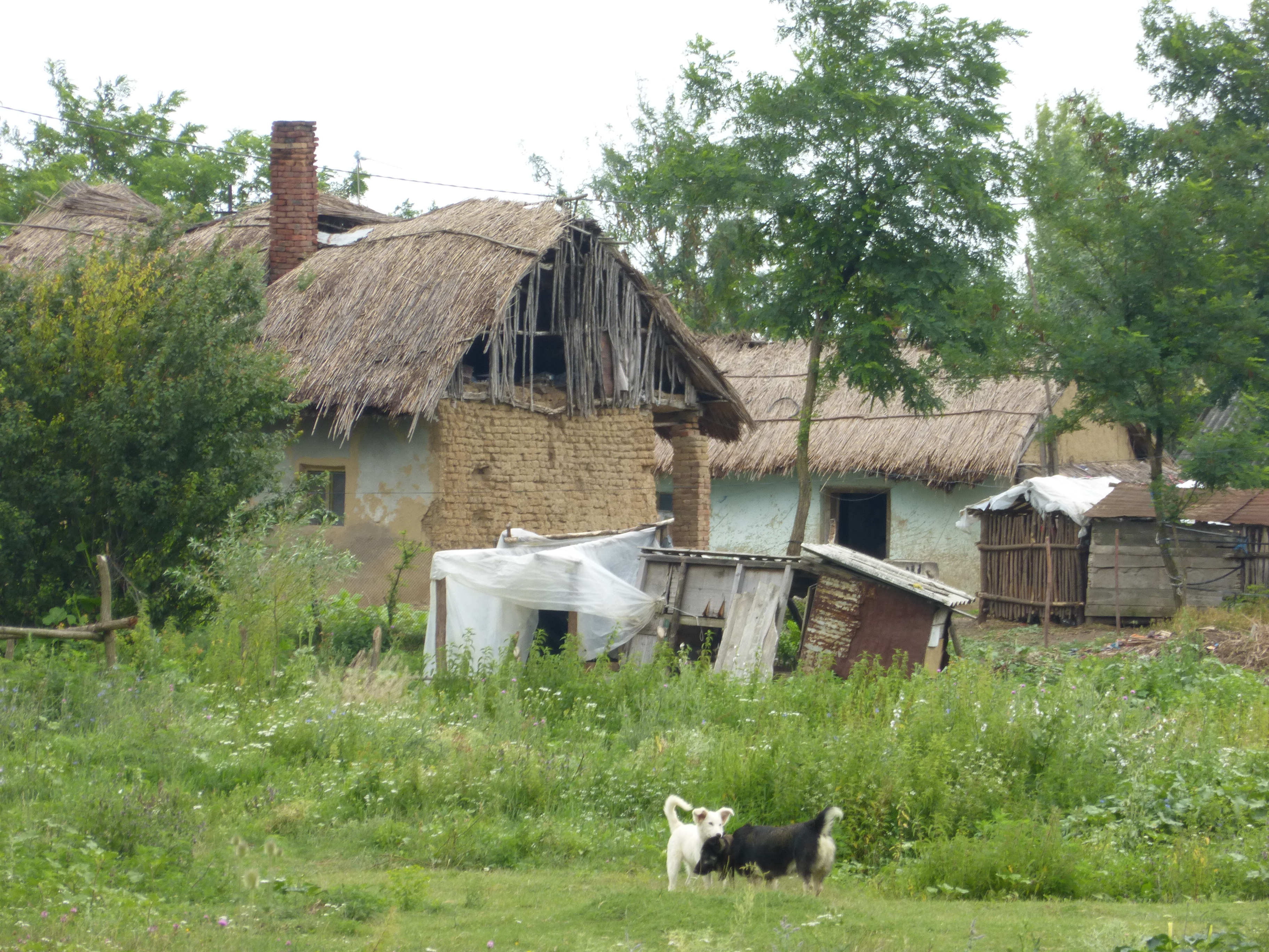 Roma-Siedlung am westlichen Ortsrand von Pișcolt